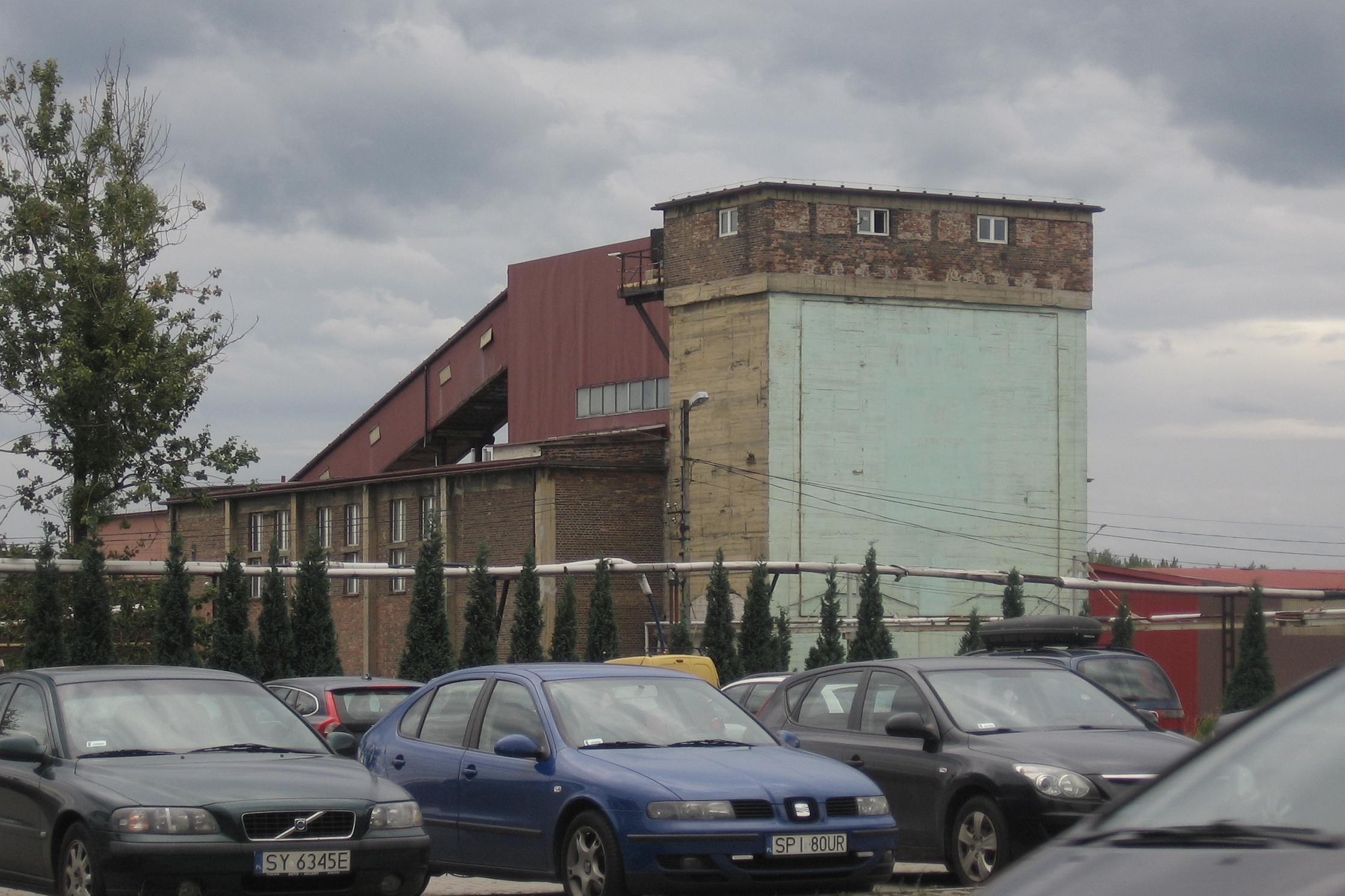 były zakład przerobu złomu w Bytomiu, ul. Siemianowicka 98 (działka nr 356/6 Rozbark KA1Y/00006397/4) na terenie zlikwidowanych Zakładów Górniczych im. Juliana Marchlewskiego